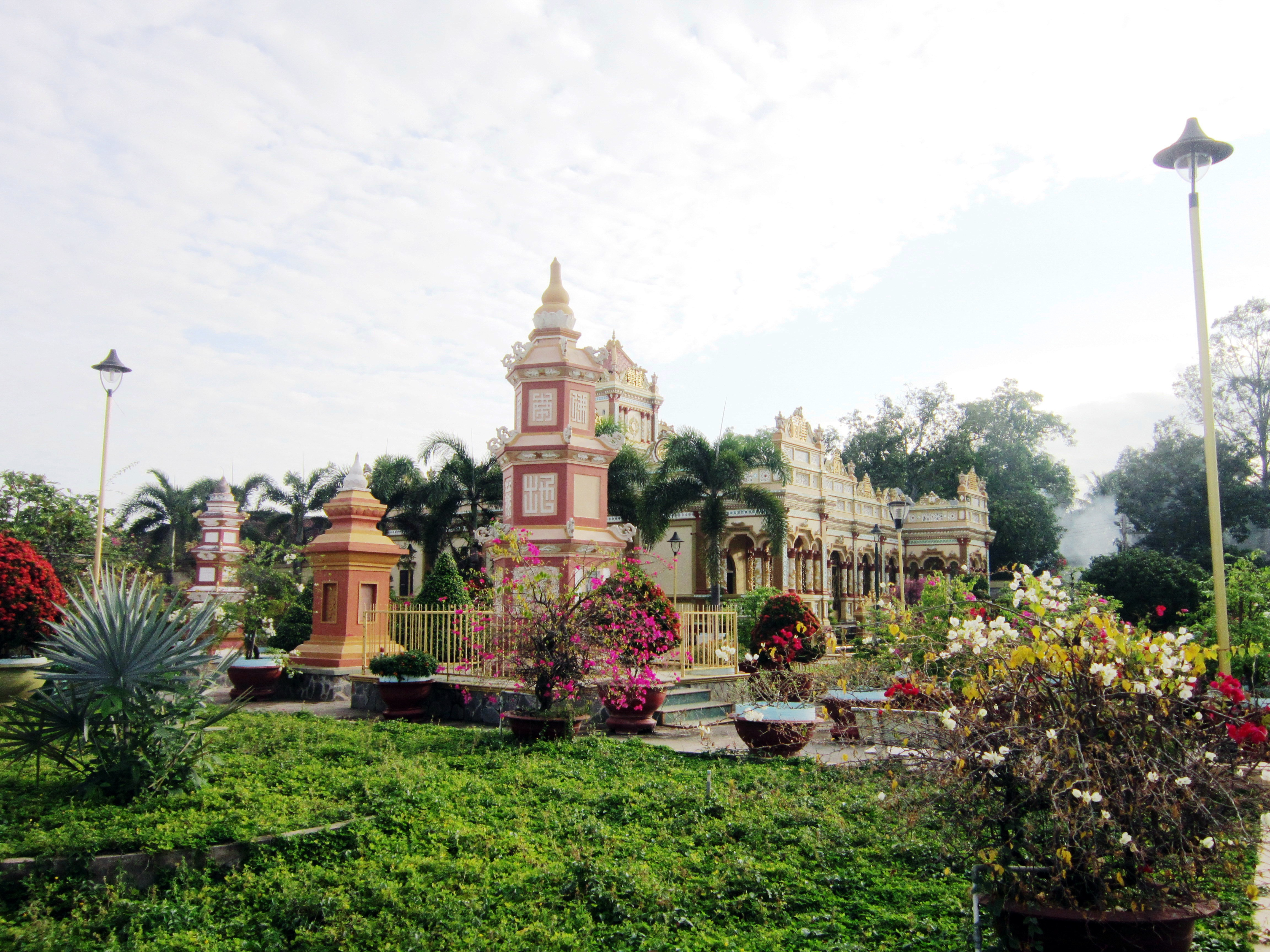 Chùa cổ Vĩnh Tràng ở thành phố Mỹ Tho, tỉnh Tiền Giang, Việt Nam.